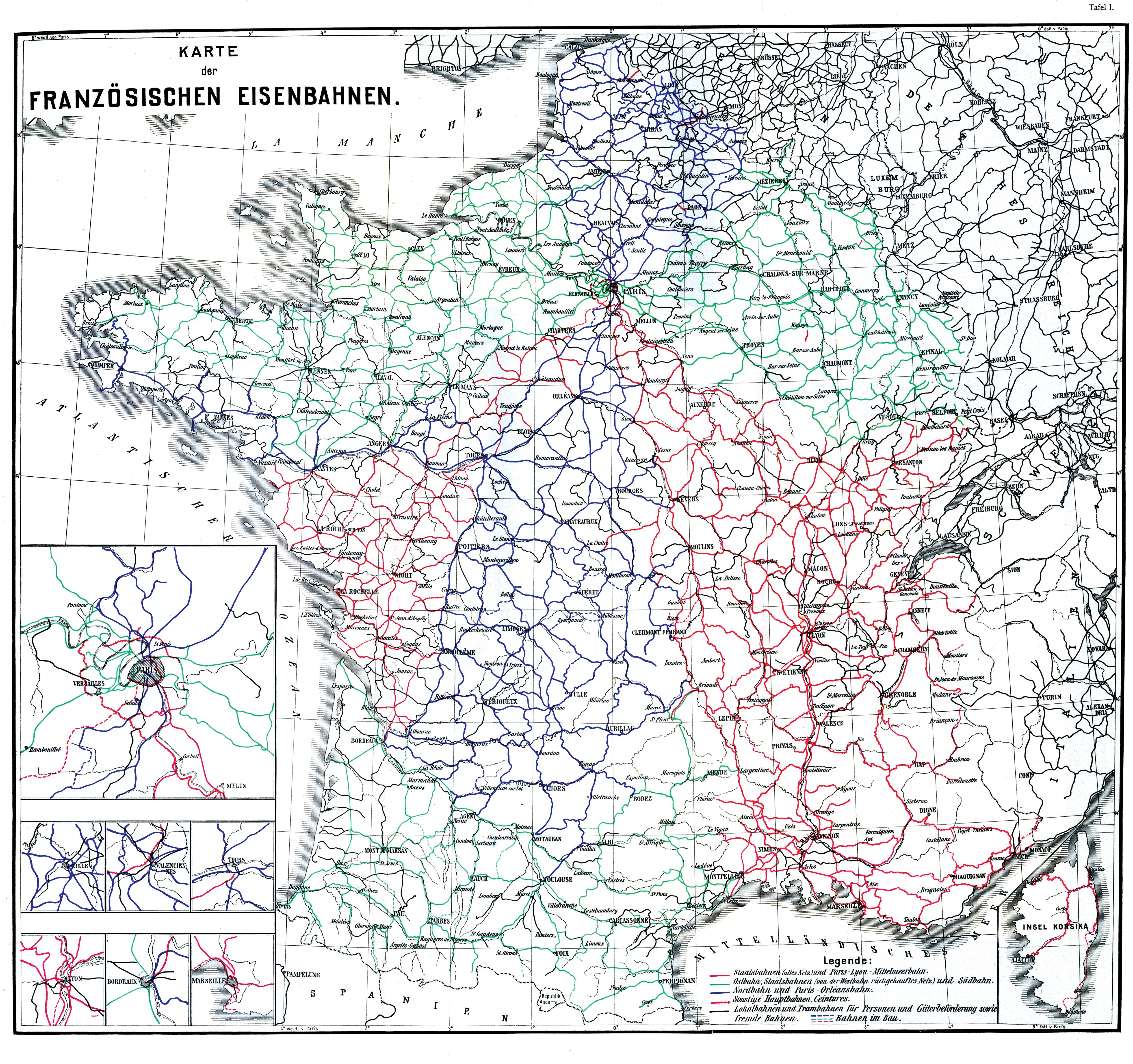 Französische Eisenbahne, Liniennetz 1914